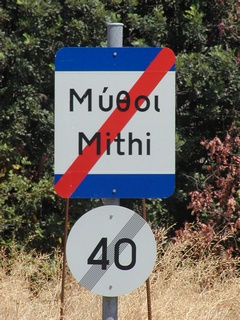 Ortsschild von Mythi